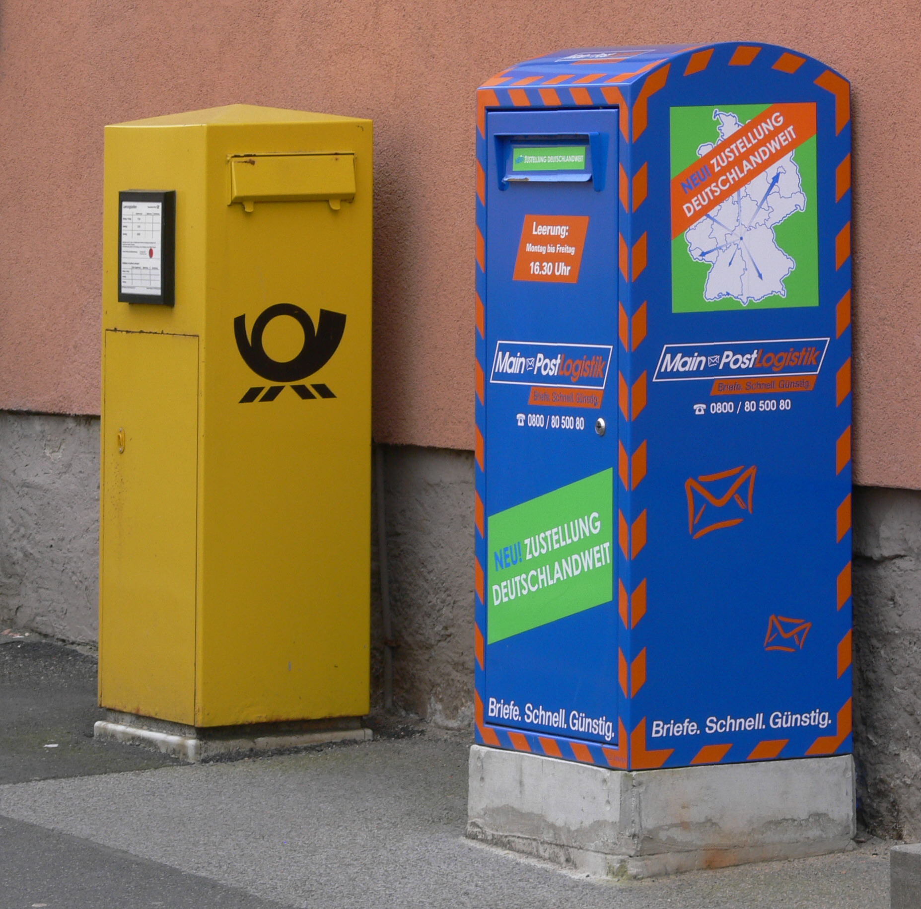 Münnerstadt Briefkästen von Deutscher Post AG und Mainpost